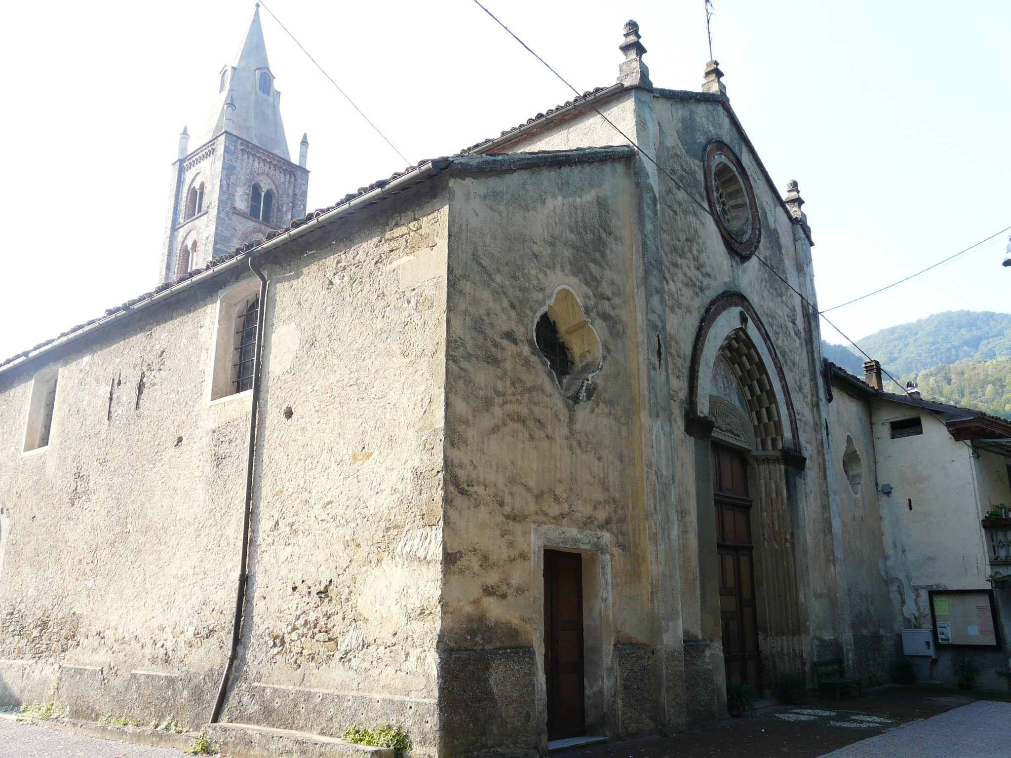 Chiesa di San Lorenzo, Murialdo, Liguria, Italia